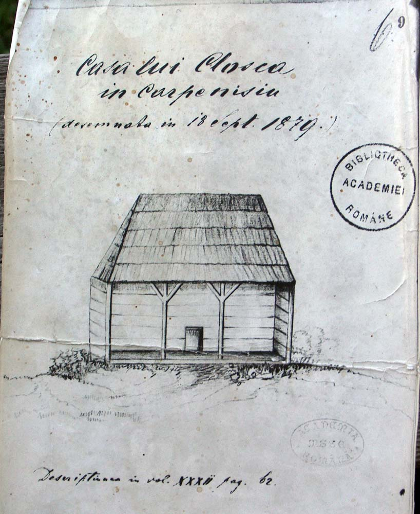 Schița casei lui Ion Oargă Cloșca, de Nicolae Densușeanu, 1879. Foto după xerox al originalului din Biblioteca Academiei Române.